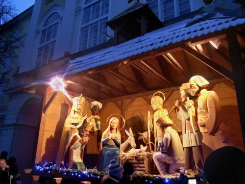 Шопка перед львівською ратушою